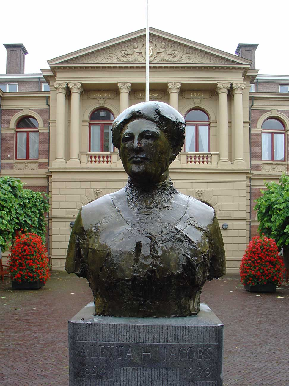 Standbeeld van Aletta Jacobs voor het Harmoniegebouw te Groningen